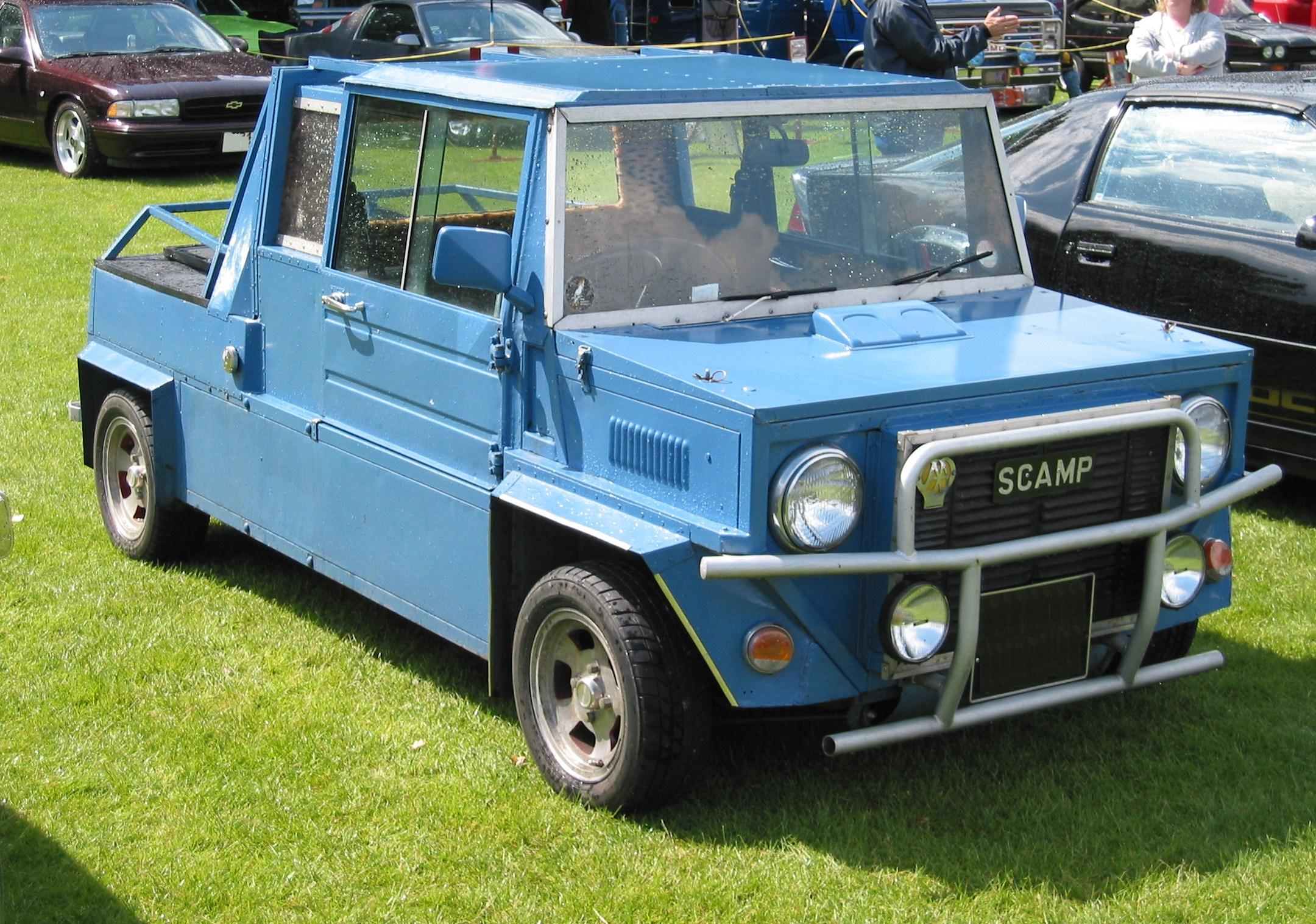 Scamp